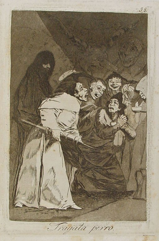 Capricho nº 58: Trágala perro de Goya, serie Los Caprichos